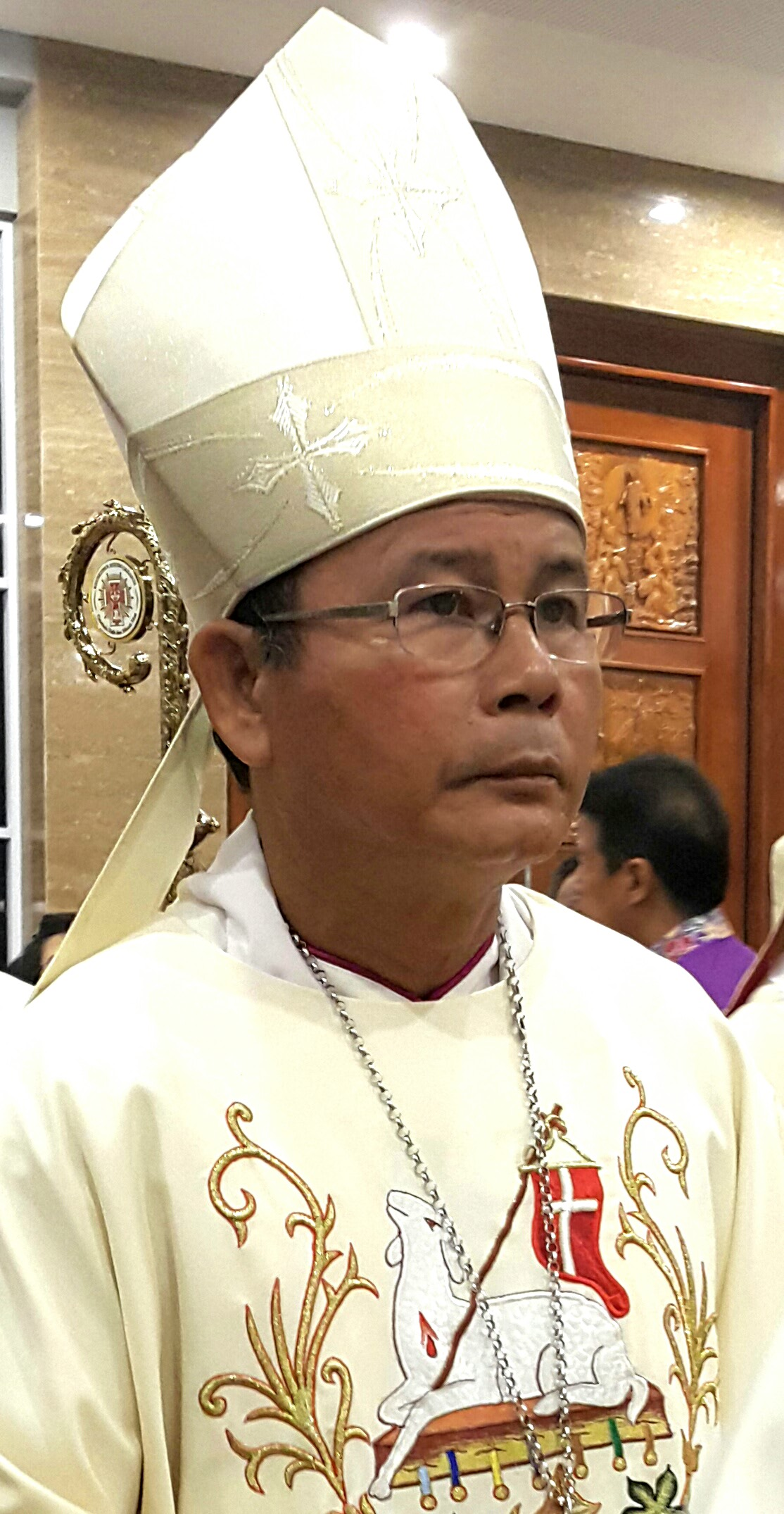 Mgr Samuel Oton Sidin, Uskup Sintang